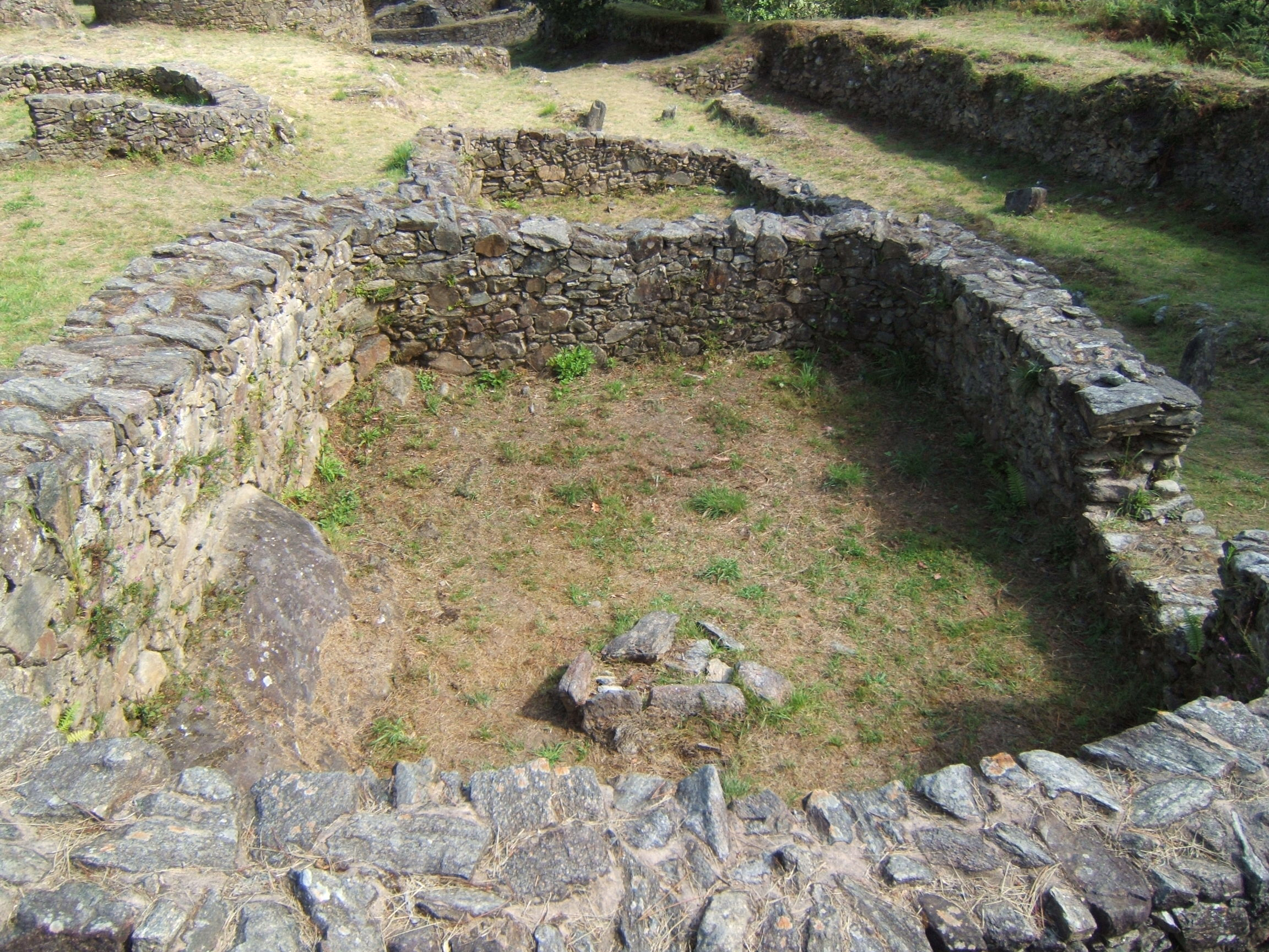 Castro de Borneiro, cerca de Ponteceso, Galicia, España